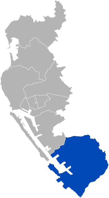 Siaogang District, Kaohsiung City